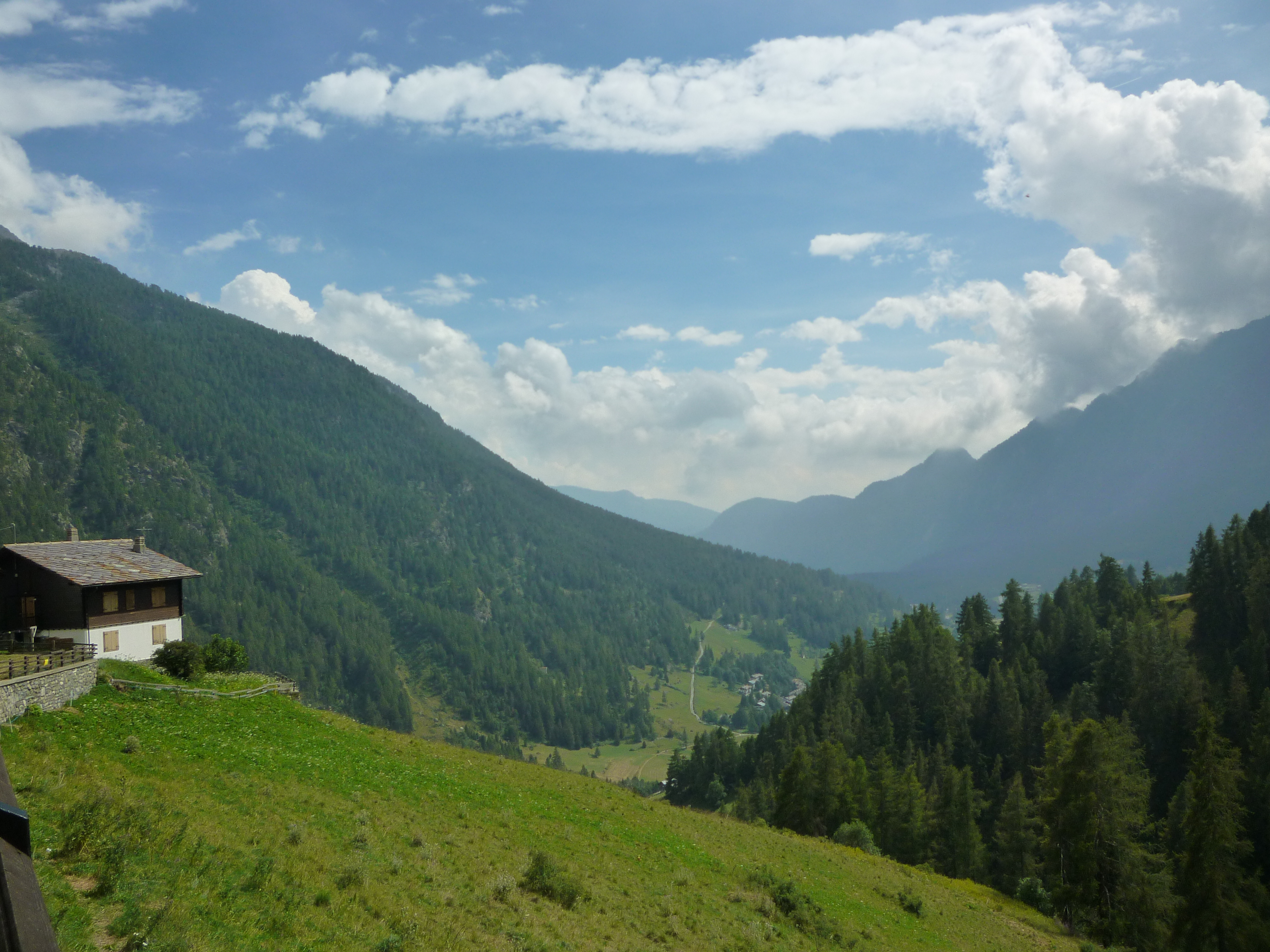 Panorama du haut val d'Ayas du hameau Bisous (Vallée d'Aoste - Italie)